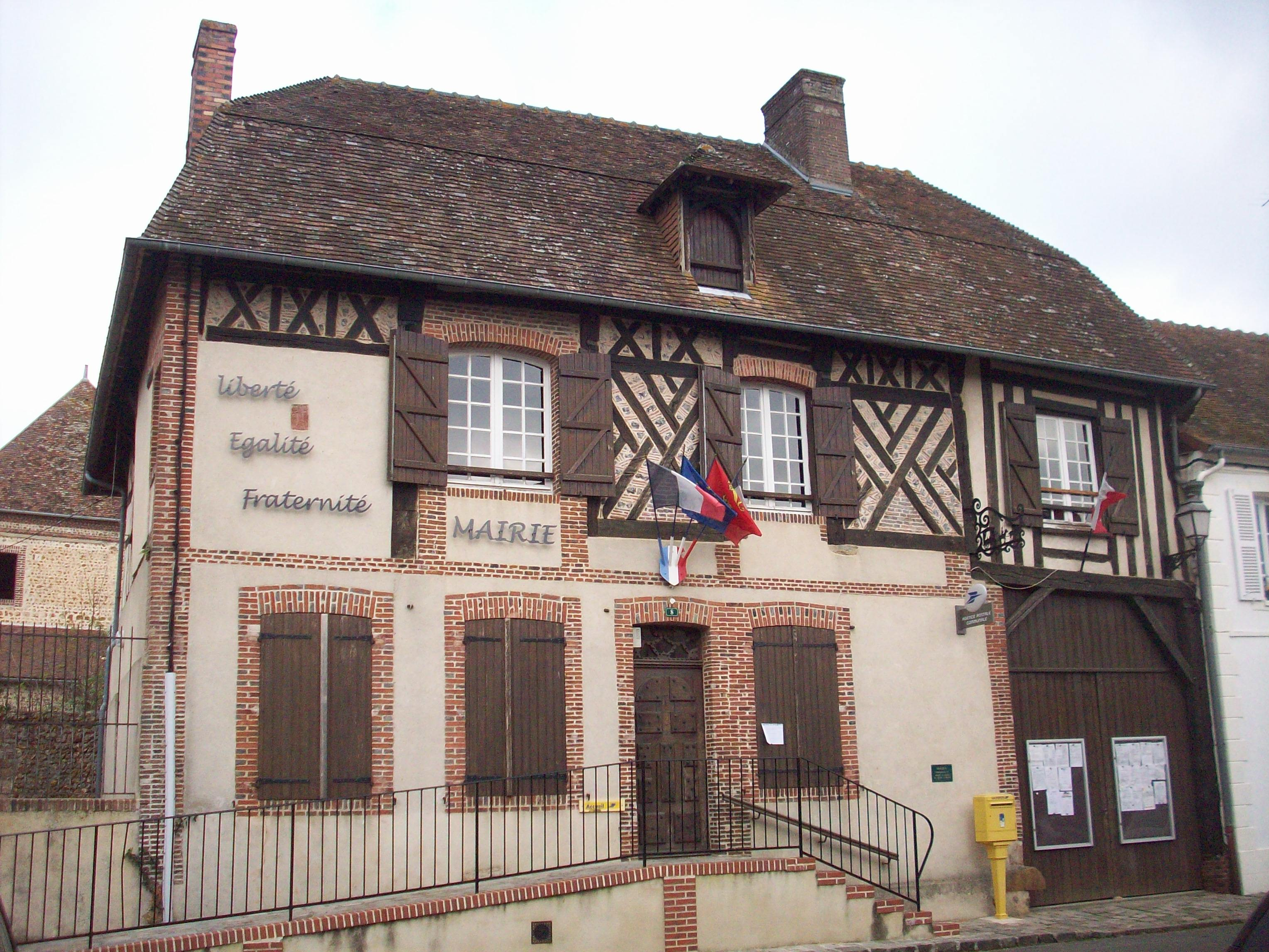 Mairie de Chennebrun.